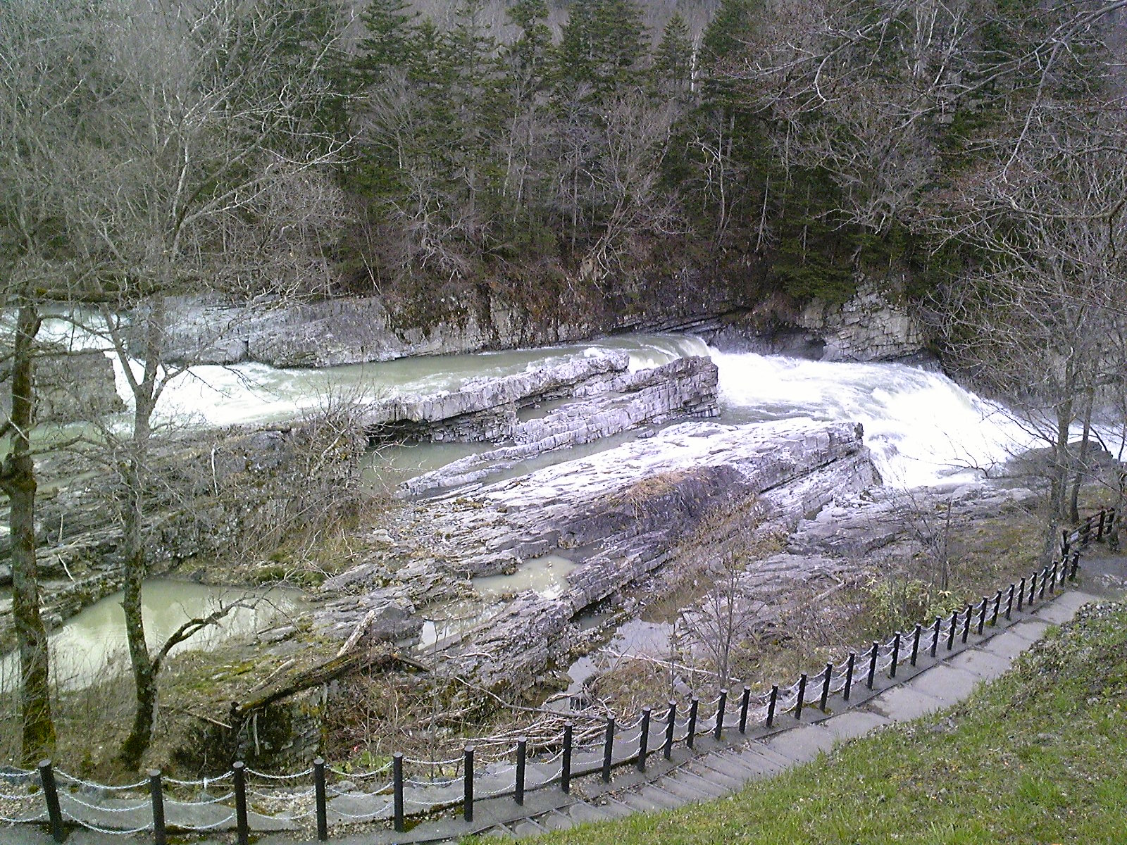 北海道芦別市にある三段の滝